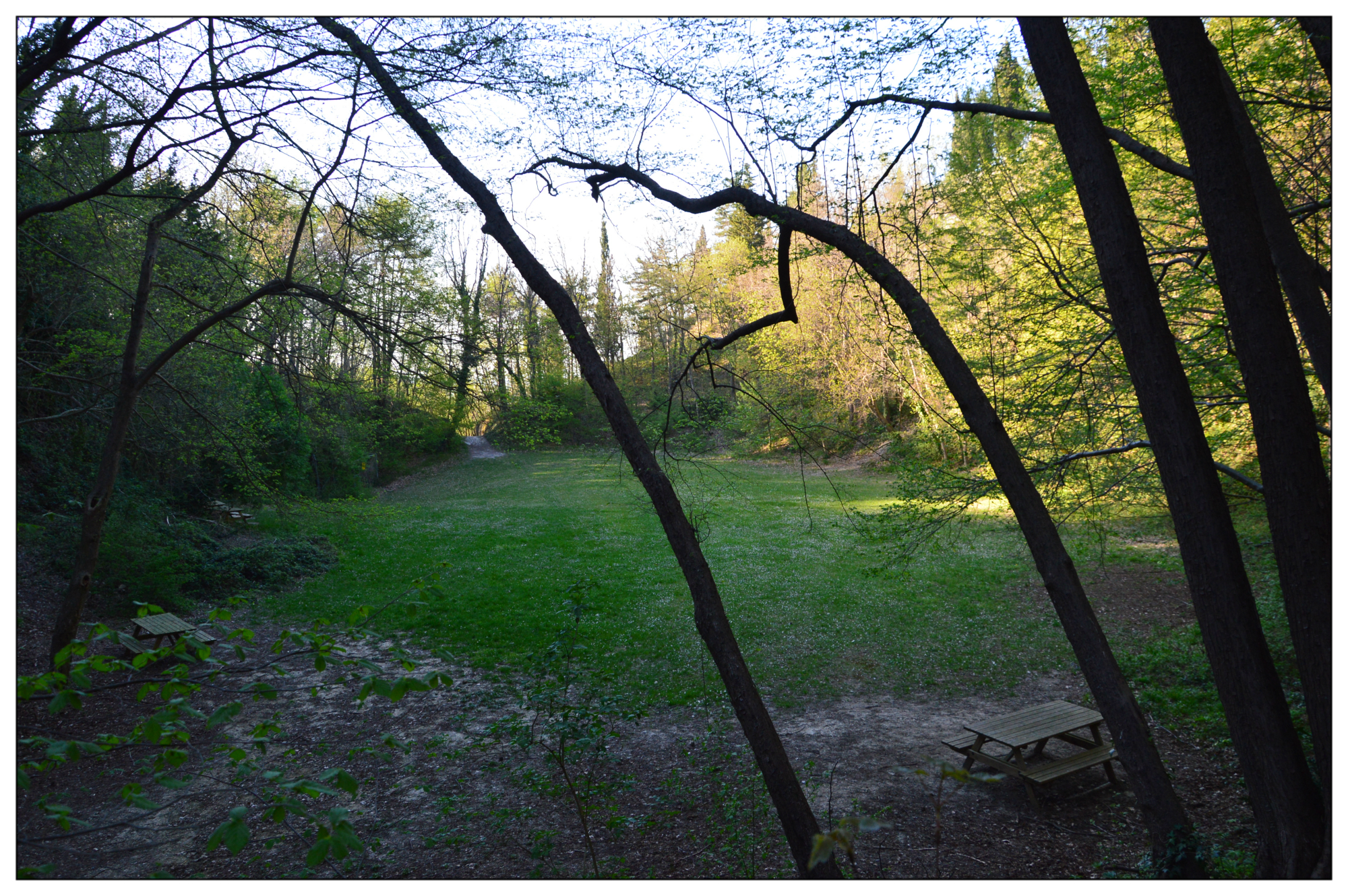 Classica Dolina. abisso Faenza. Carnè